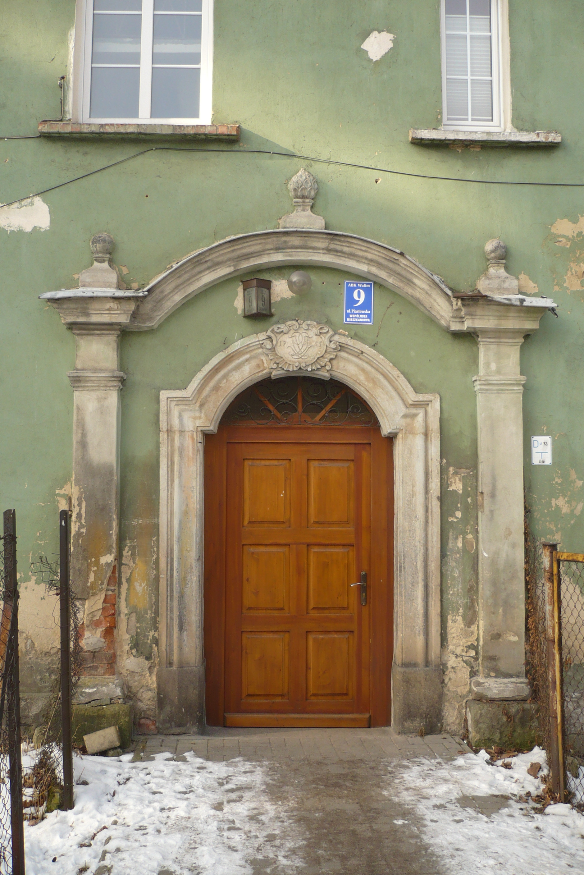 Walim, Walim: portal, ul. Piastowska 9